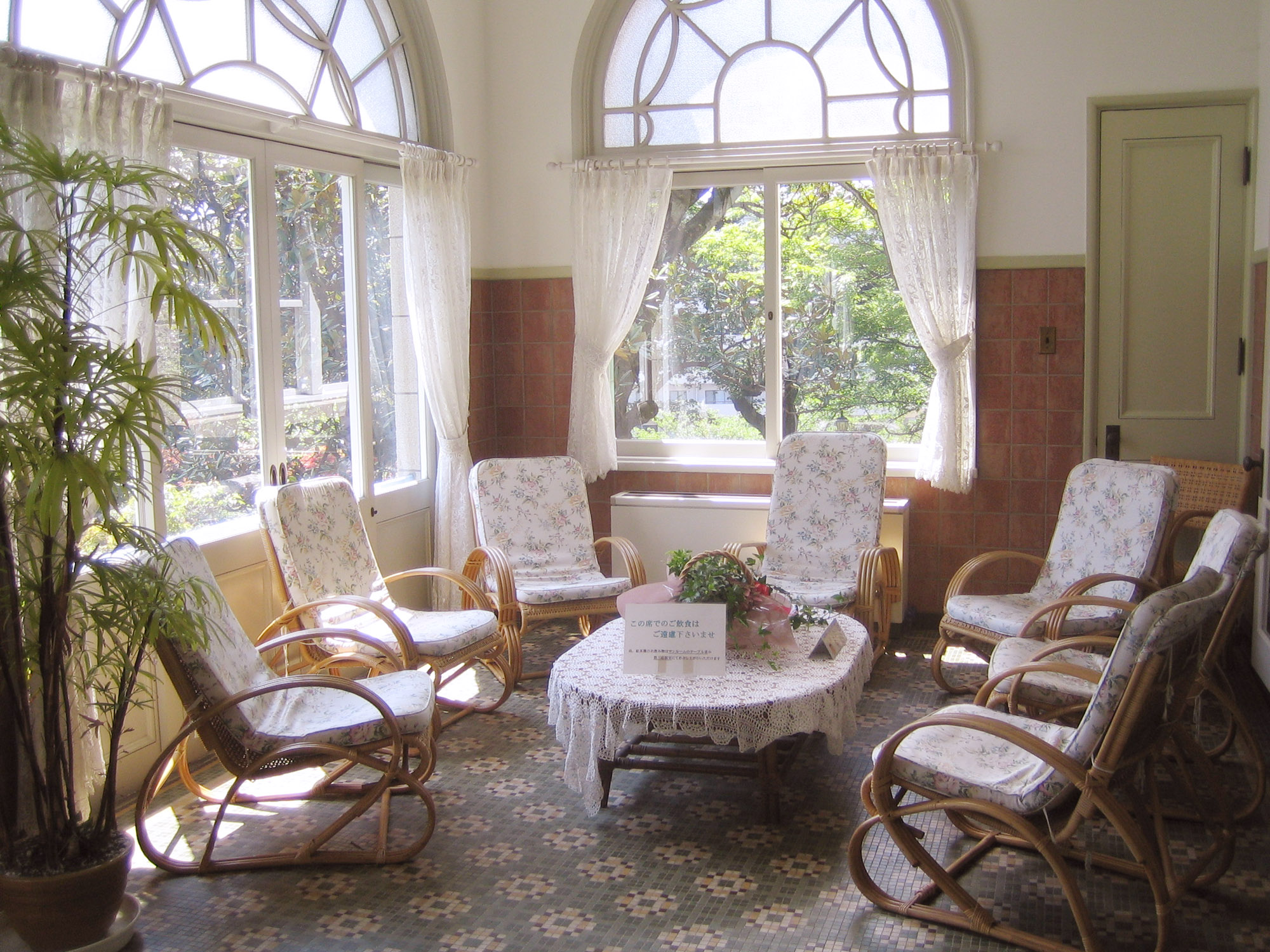 Hatoyama Hall (鳩山会館), at Otowa, Bunkyo, Tokyo, Japan